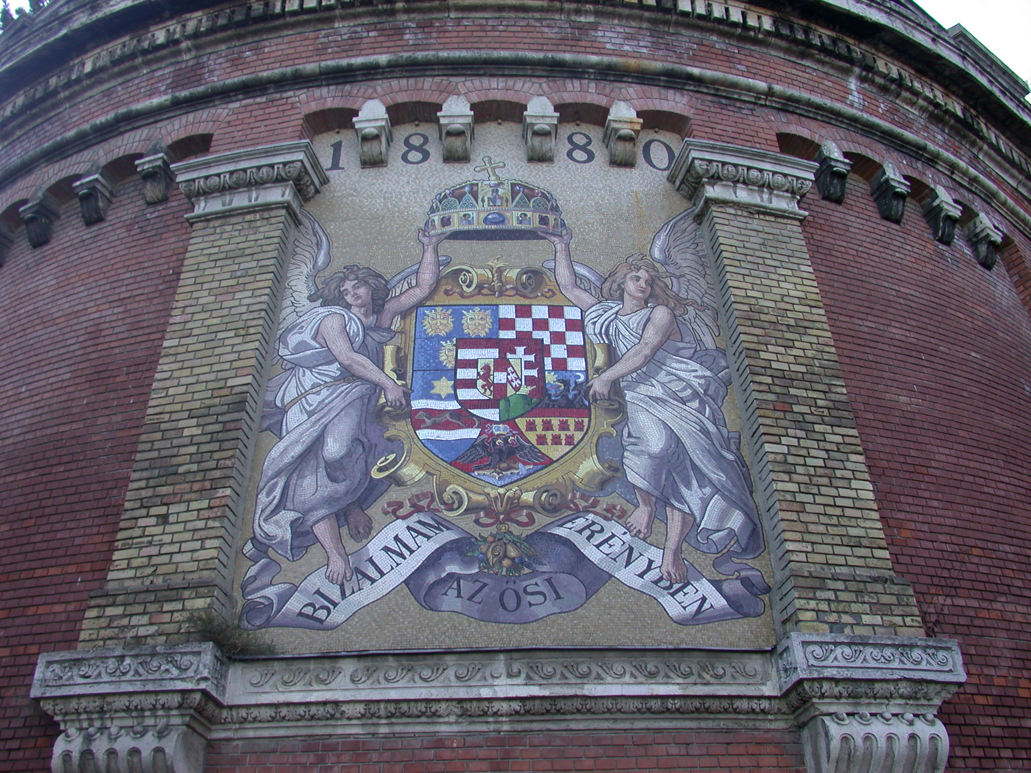 Dawny herb Węgier w Budapeszcie